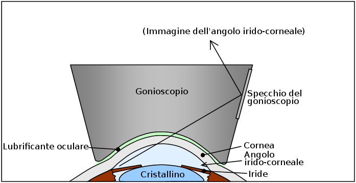 Gonioscopy